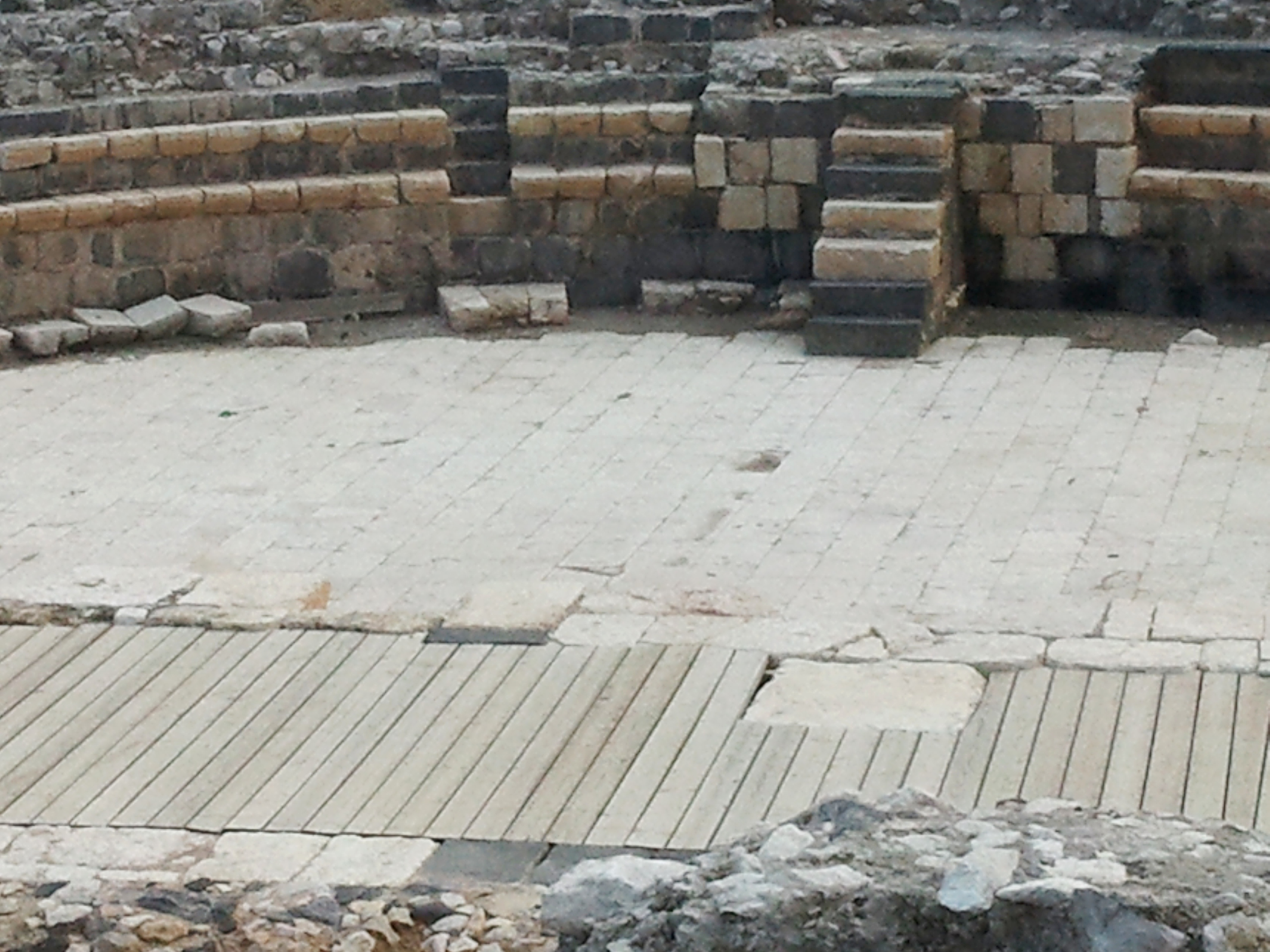 התיאטרון הרומי בטבריה הוא אתר ארכאולוגי השוכן בחלקה הדרומי של טבריה באזור הפארק הארכאולוגי של העיר לרגלי הר ברניקי האורכסטרה של התיאטרון ותחילת המושבים